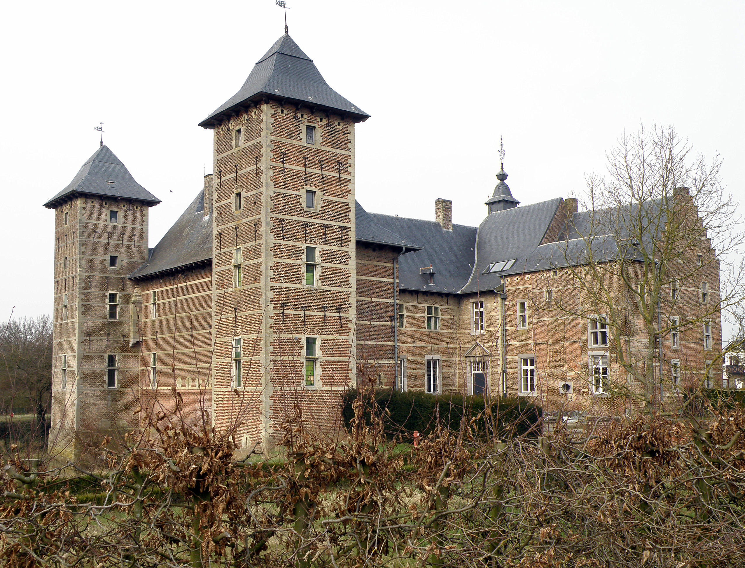 Rijkel, deelgemeente van Borgloon (prov. Limburg, België). Kasteel van Rijkel.